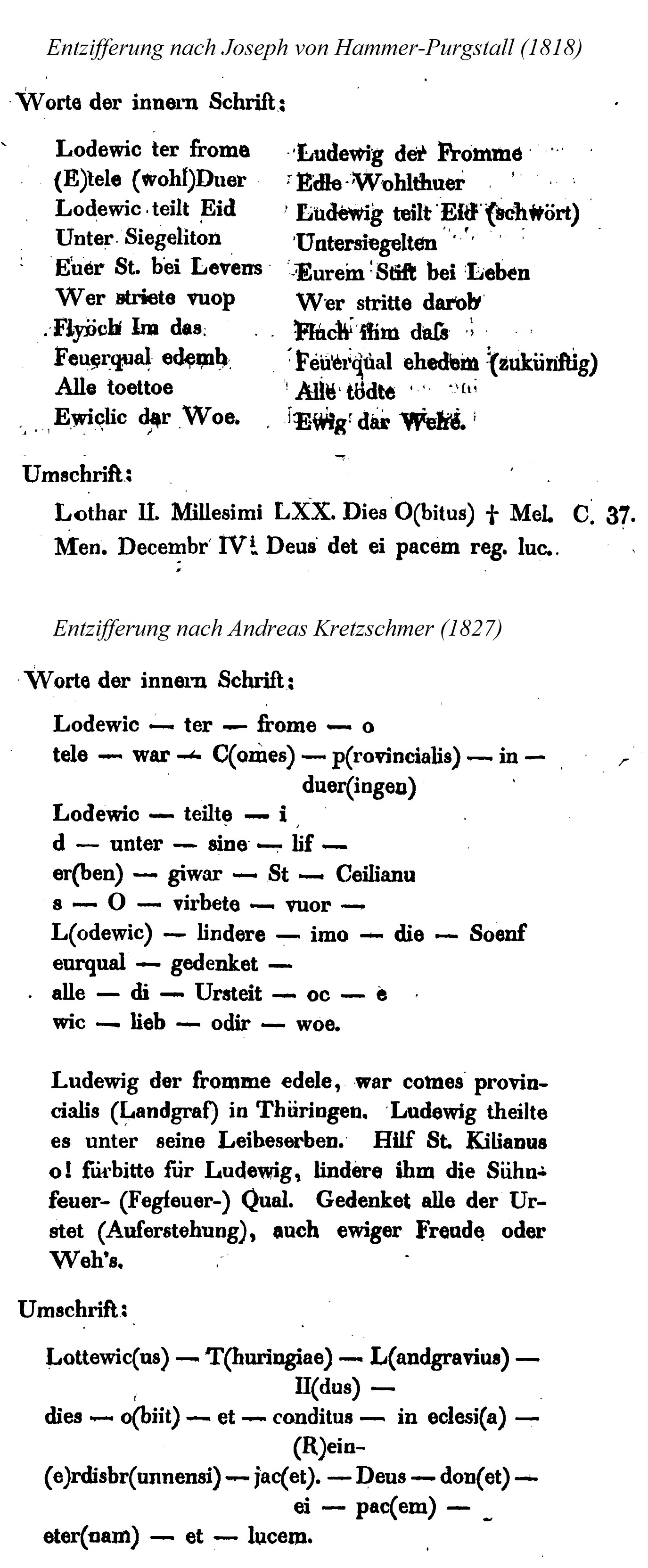 Entzifferungen der Heilsberger Inschrift durch Joseph von Hammer-Purgstall (1818) und Andreas Kretzschmer (1827). Die Identität von A. Kretschmer mit Andreas Kretzschmer wird bestätigt durch das Vorwort des Herausgebers, der den Verfasser als Geheimen Kriegsrath bezeichnet (S. 94).